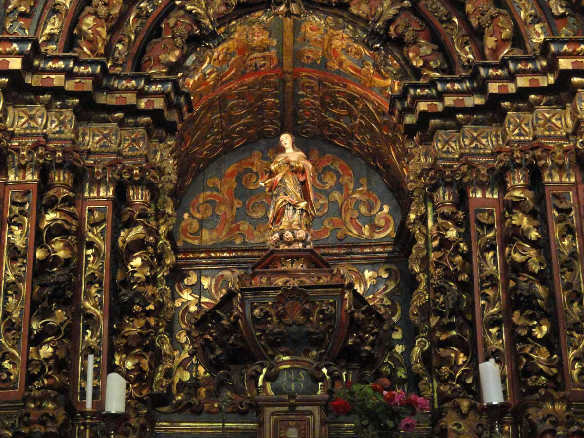 Altar da Igreja de Nossa Senhora do Ó